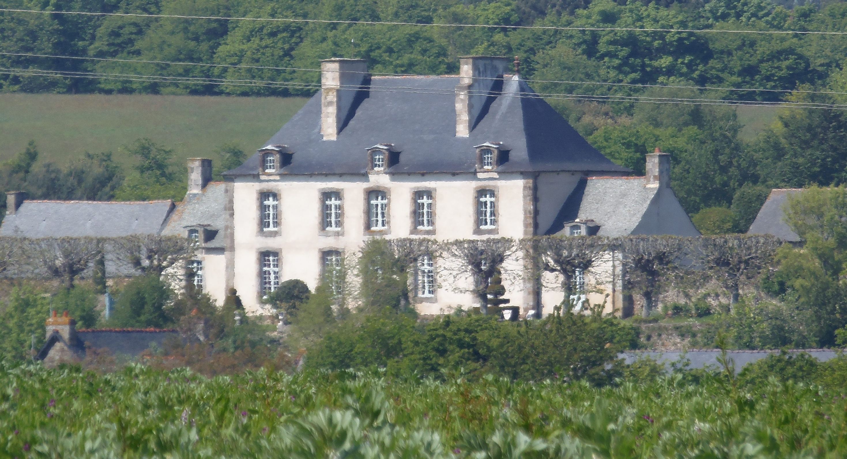 Saint-Méloir-des-Ondes (Bretagne, France). Malouinière de Val Ernoul.